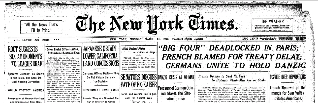 DISPUTE OVER REPARATIONS